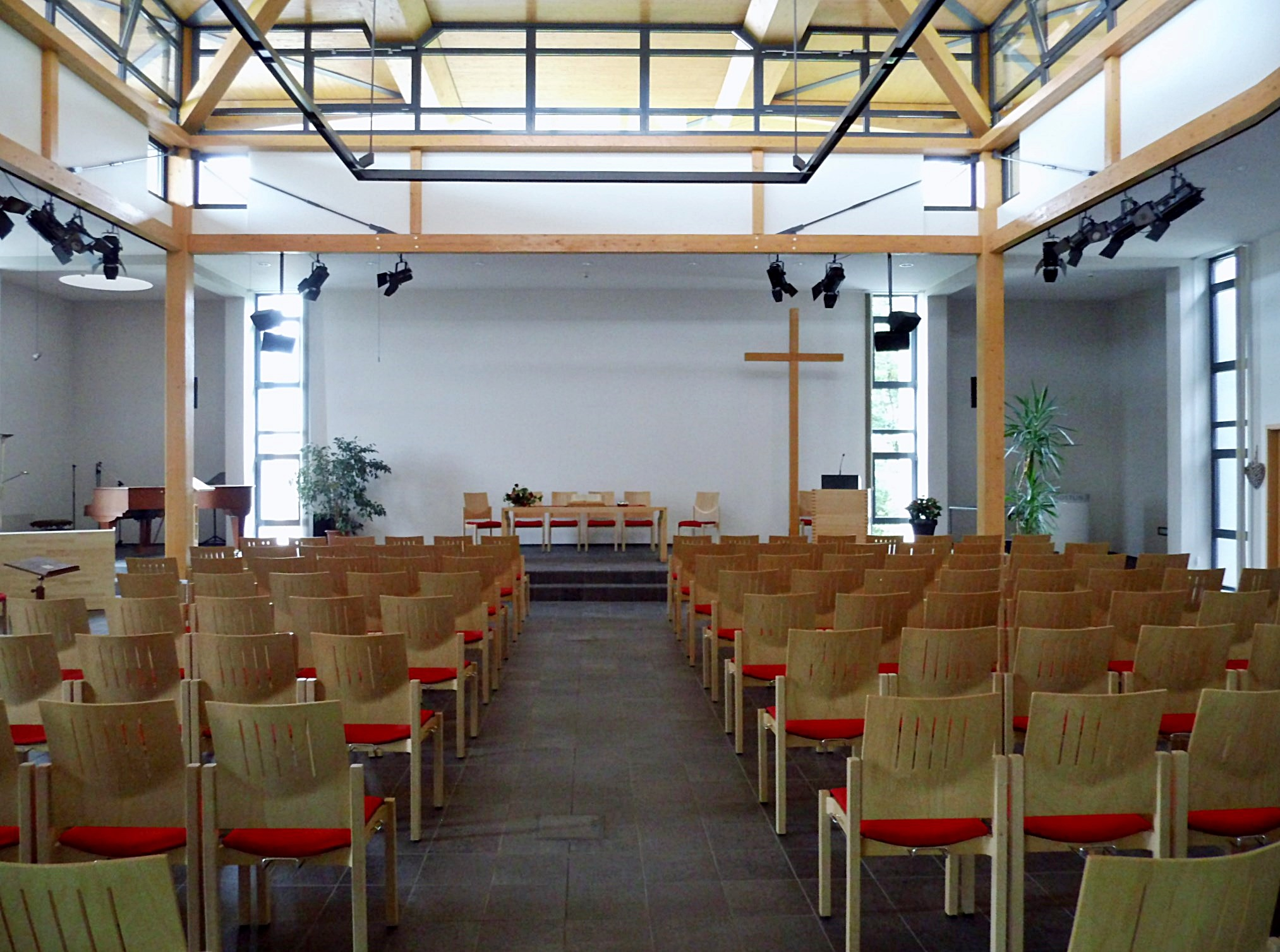 Innenansicht der baptistischen Christuskirche in Heiligenstadt in Oberfranken, Bayern, Deutschland